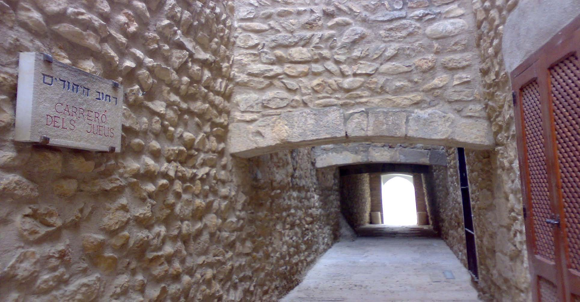 callejon judios